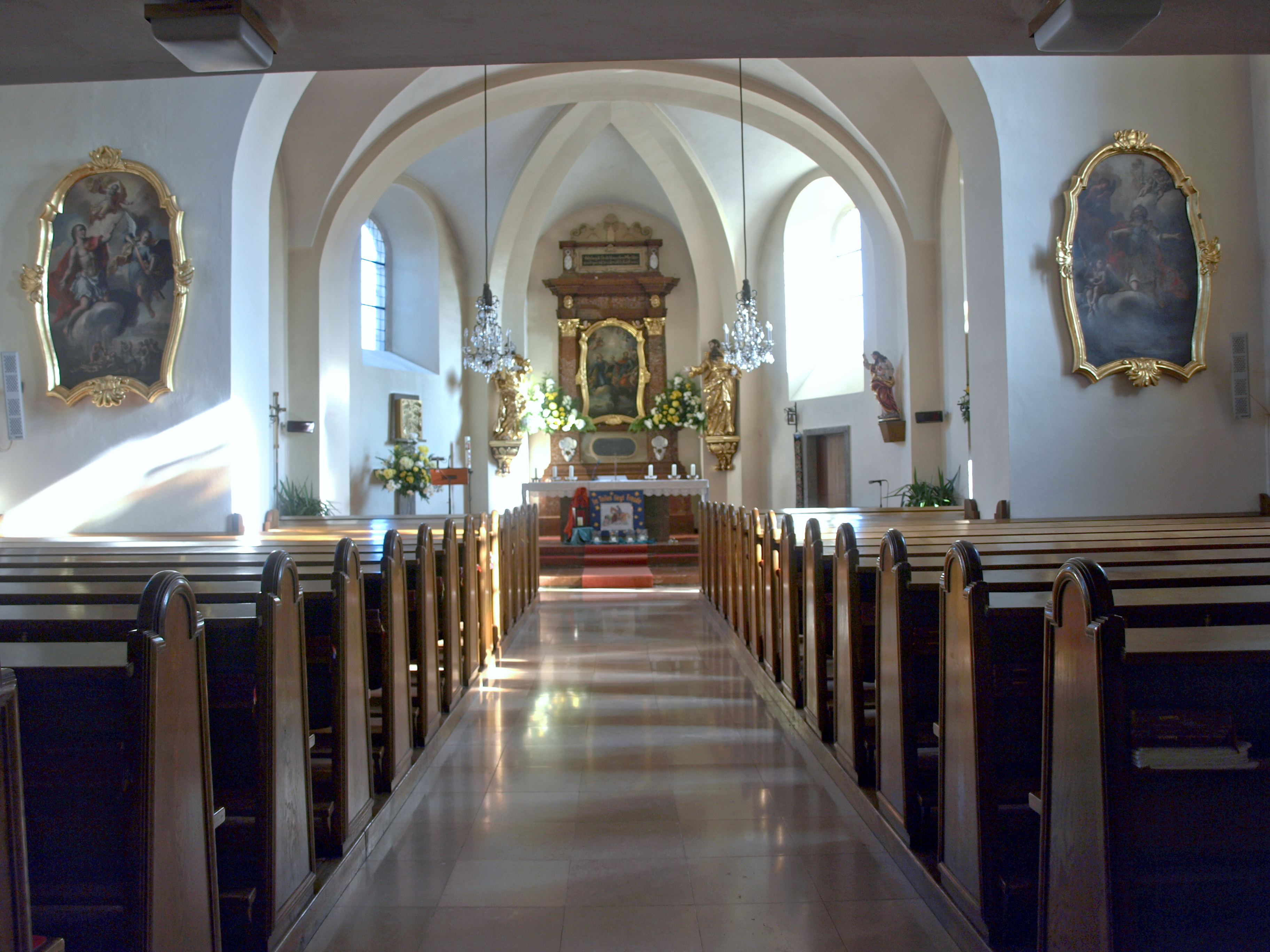 Kath. Pfarrkirche hll. Petrus und Paulus